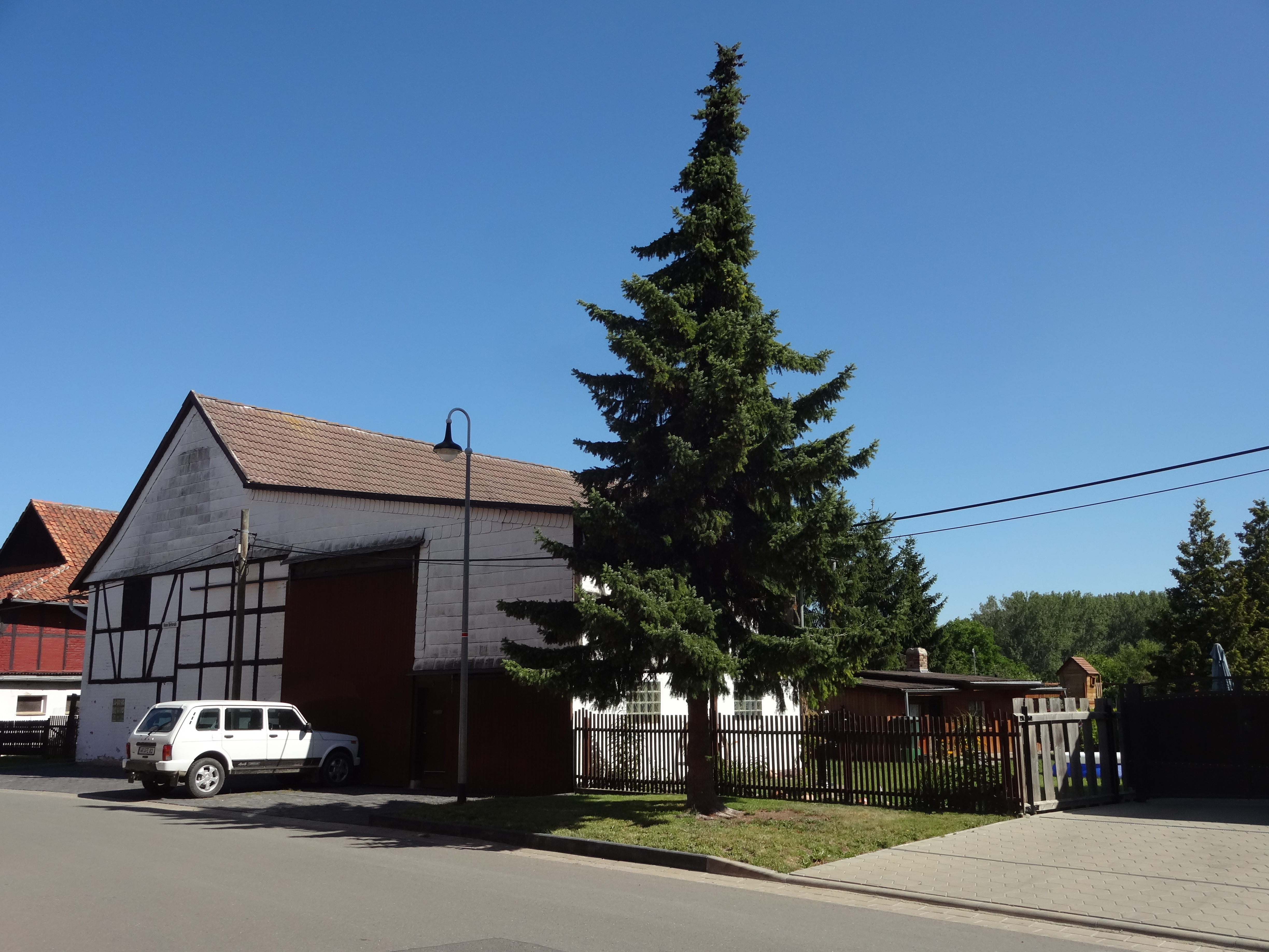 ehemals denkmalgeschütztes Bauernhaus in der Kleinen Dorfstraße 3 in Langeln, Gemeinde Nordharz